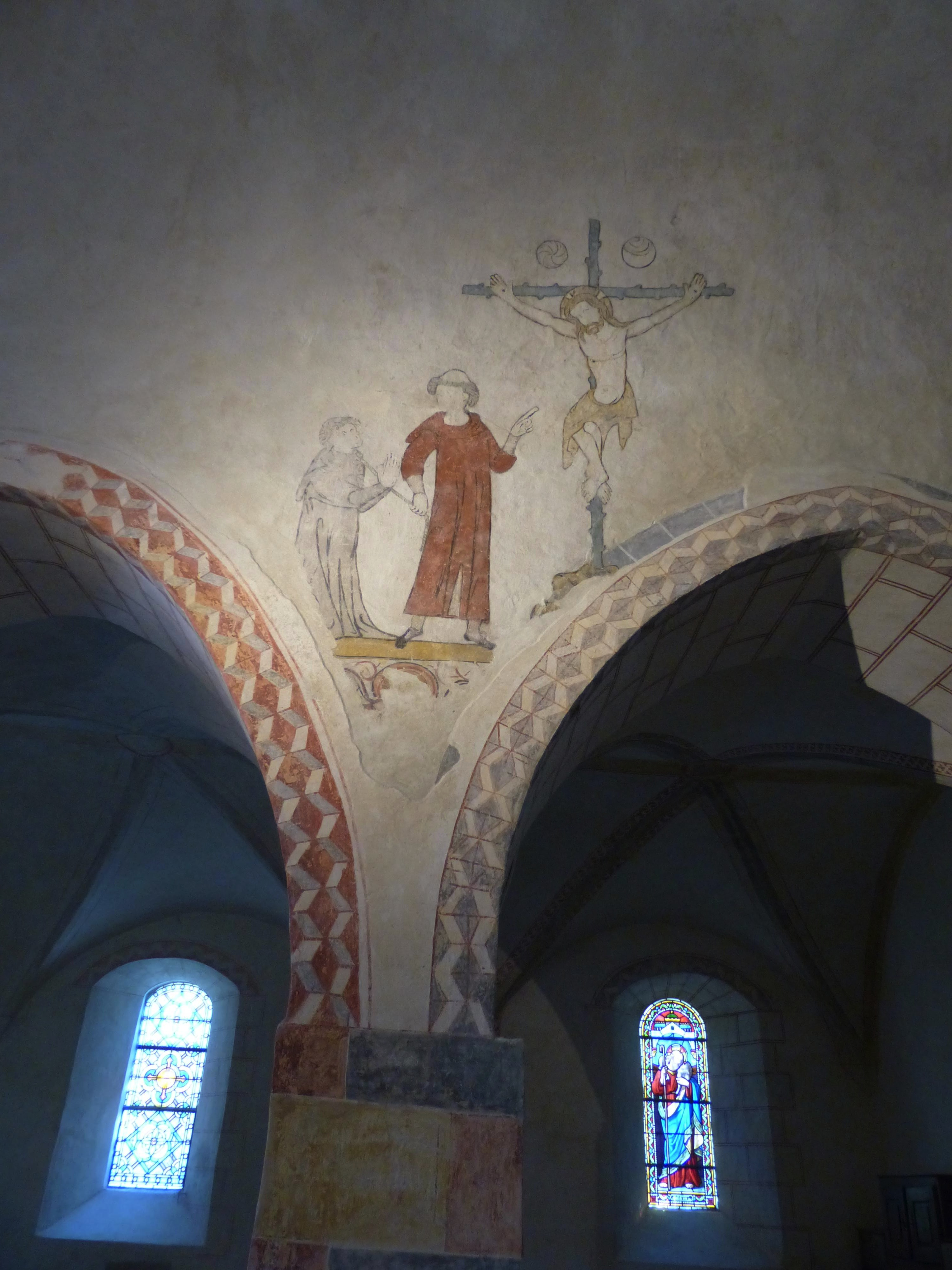 Louchy-Montfand (Allier, France). Église Saint-Pourçain. Peinture murale. Scène de pénitence : un moine montre le Christ en croix à un pénitent qu'il tient par une corde attachée à son cou. XVe siècle.